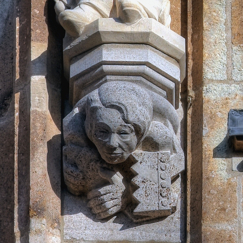 Rathausturm Köln: Konsole unter der Stuebben-Statue: „Dr. Hanna Adenauer“. Bildhauer: Gerd Haas